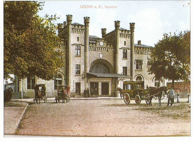 Polska, woj. wielkopolskie, Leszno, stary dworzec kolejowy w Lesznie po rozbudowie w 1909 r. Obecnie nieistniejący.